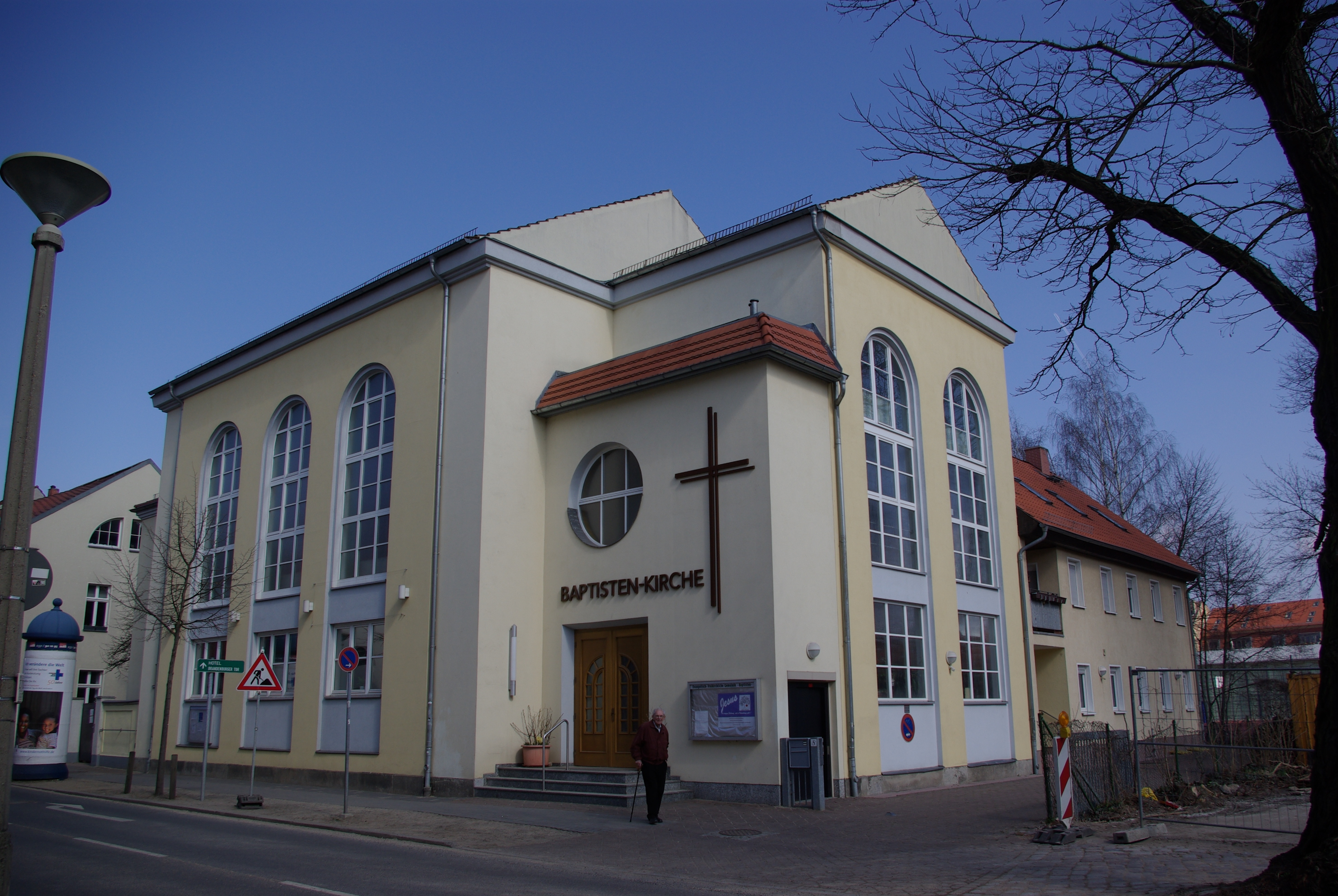 Potsdam in Brandenburg. Die Baptistenkirche befindet sich in der Schopenhauerstraße in Potsdam.